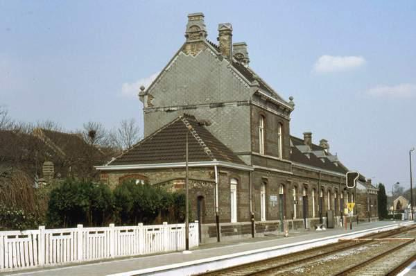 Station Wondelgem - Eigen foto